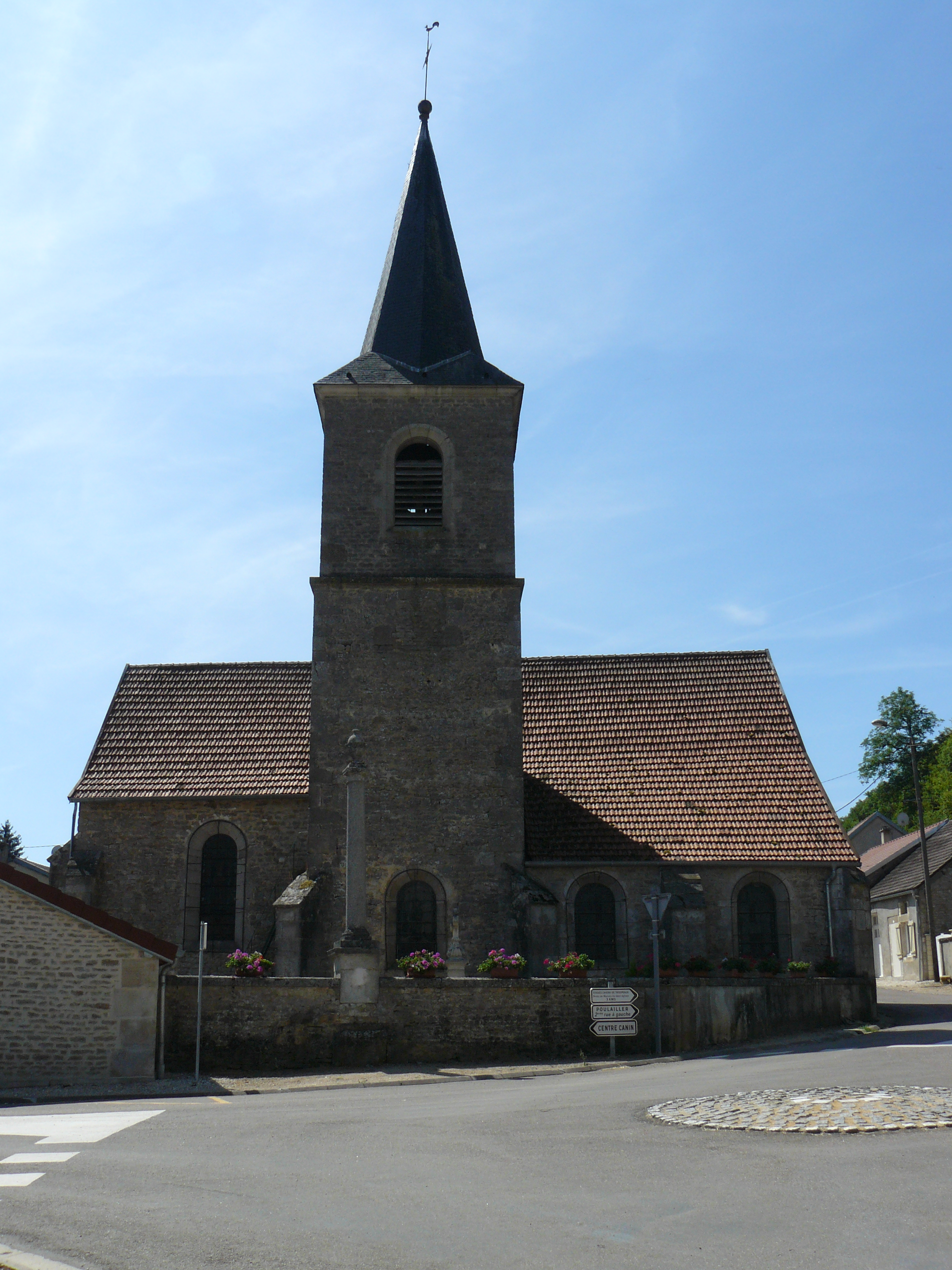 Église Saint-Thomas de Canterbury de Louvières (Haute-Marne).